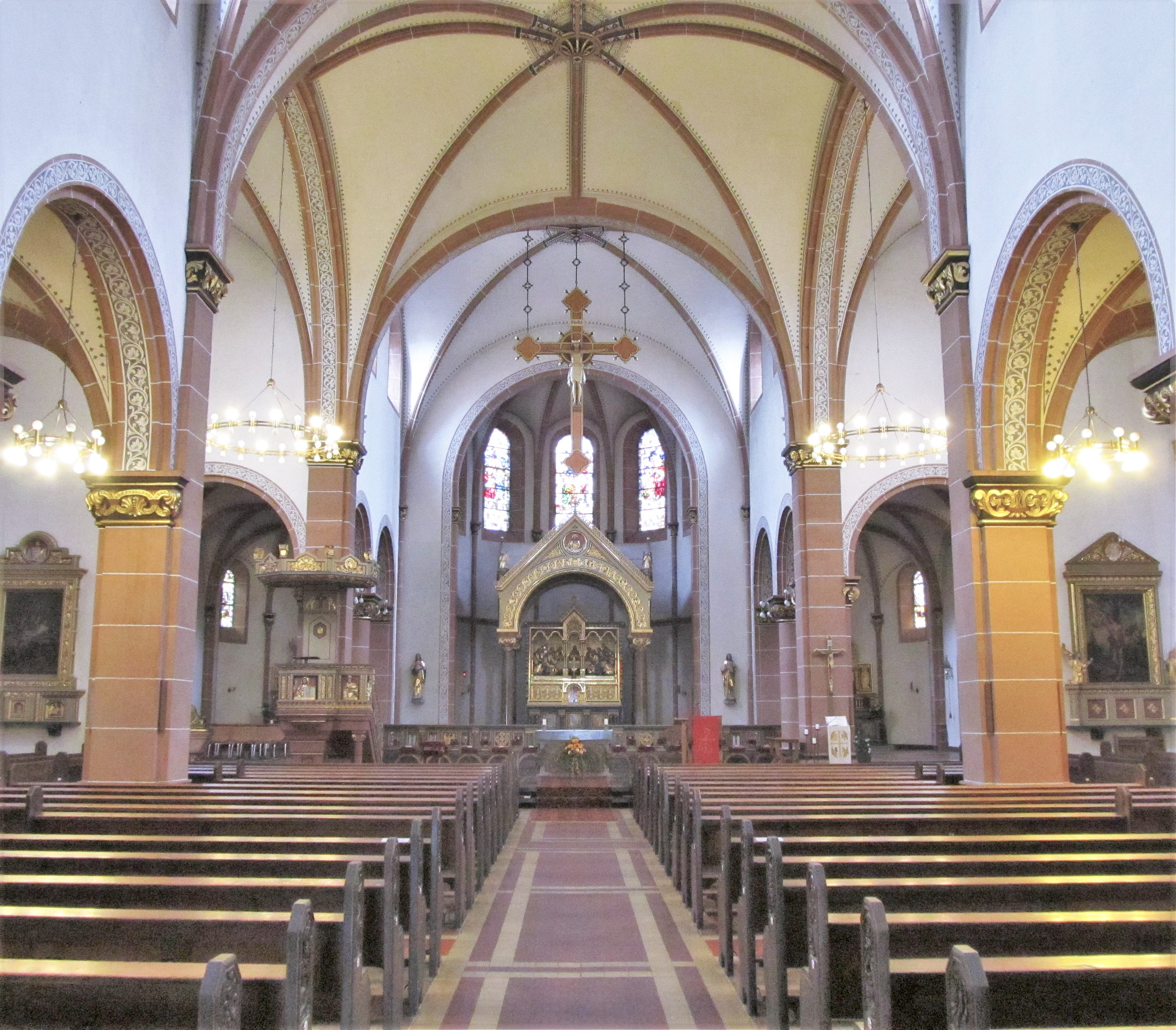 Blick ins Innere der katholischen Pfarrkirche St. Sebastian in Püttlingen, Saarland